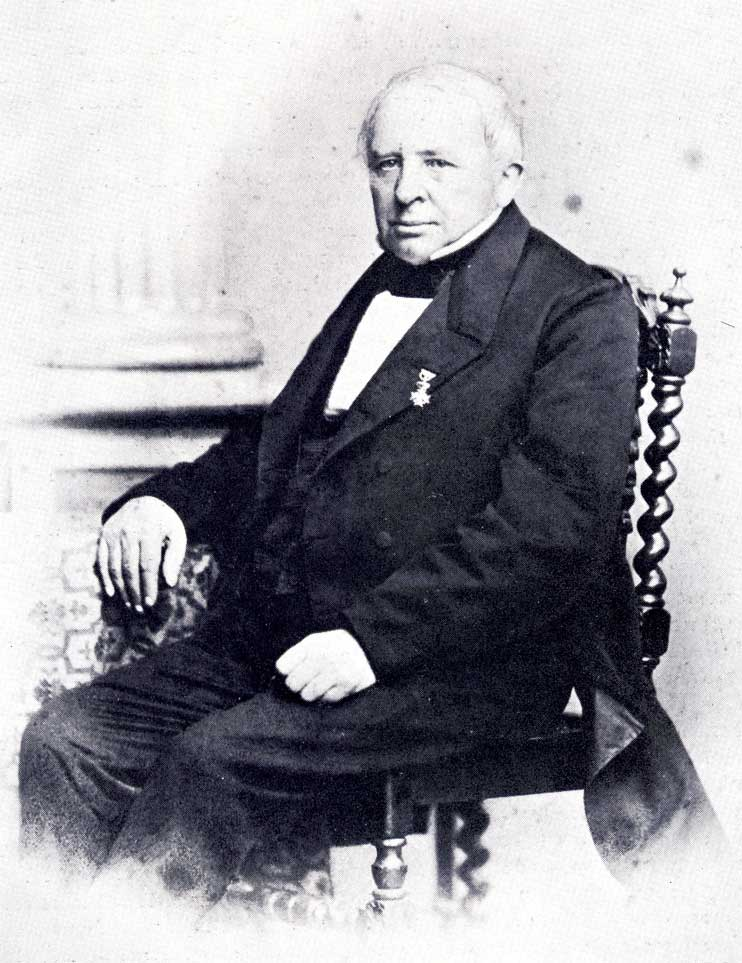 Jan Arend Godert baron de Vos van Steenwijk (1799-1872)